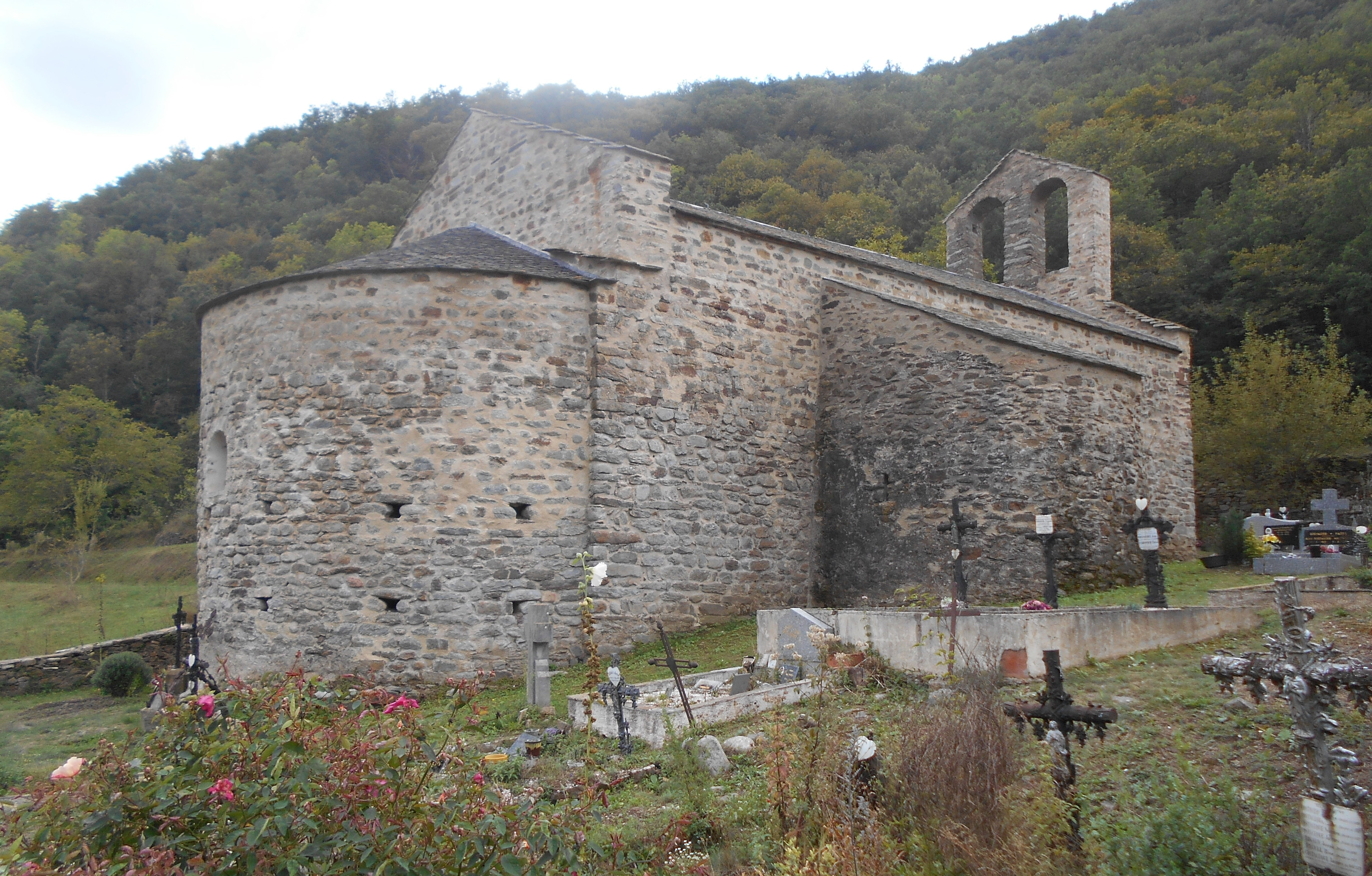 Antiga església de Sant Andreu de Vallestàvia